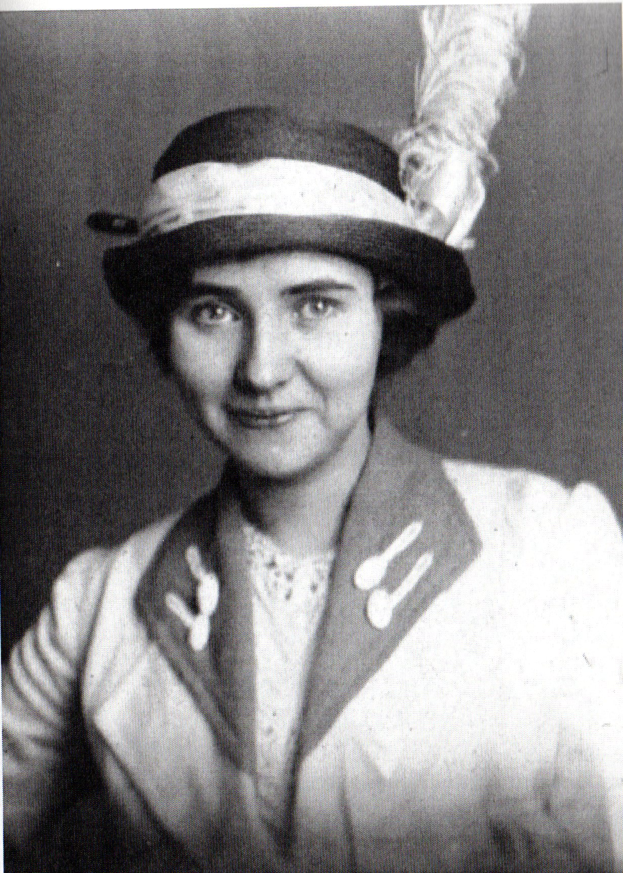 Tilde Klose 1913, Aufnahme im Stadtarchiv Solingen